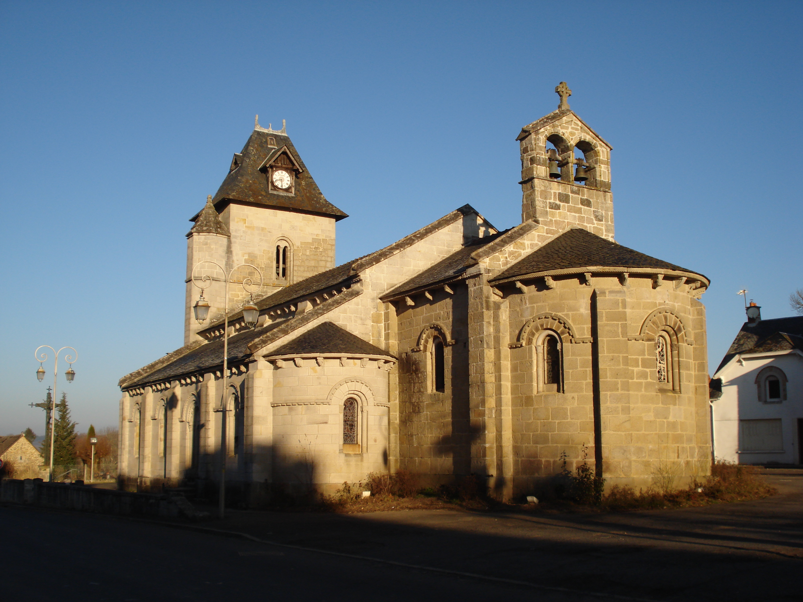 L'église de Champagnac dans le Cantal